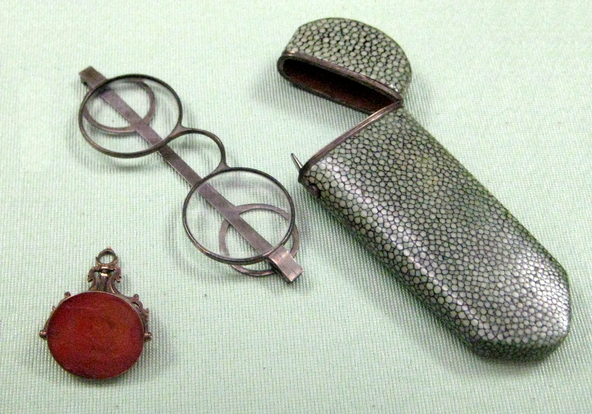 1. Печать привесная Екатерины II. 2-я пол. 18 века. Сердолик. ГИМ 2. Очки императрицы Екатерины II. Петербург, посл. ч. 18 века. Серебро, дерево, кожа акулы, медь, стекло. Пожалованы петербургскому вице-губернатору П.И. Новосильцеву 4 ноября 1786. ГИМ